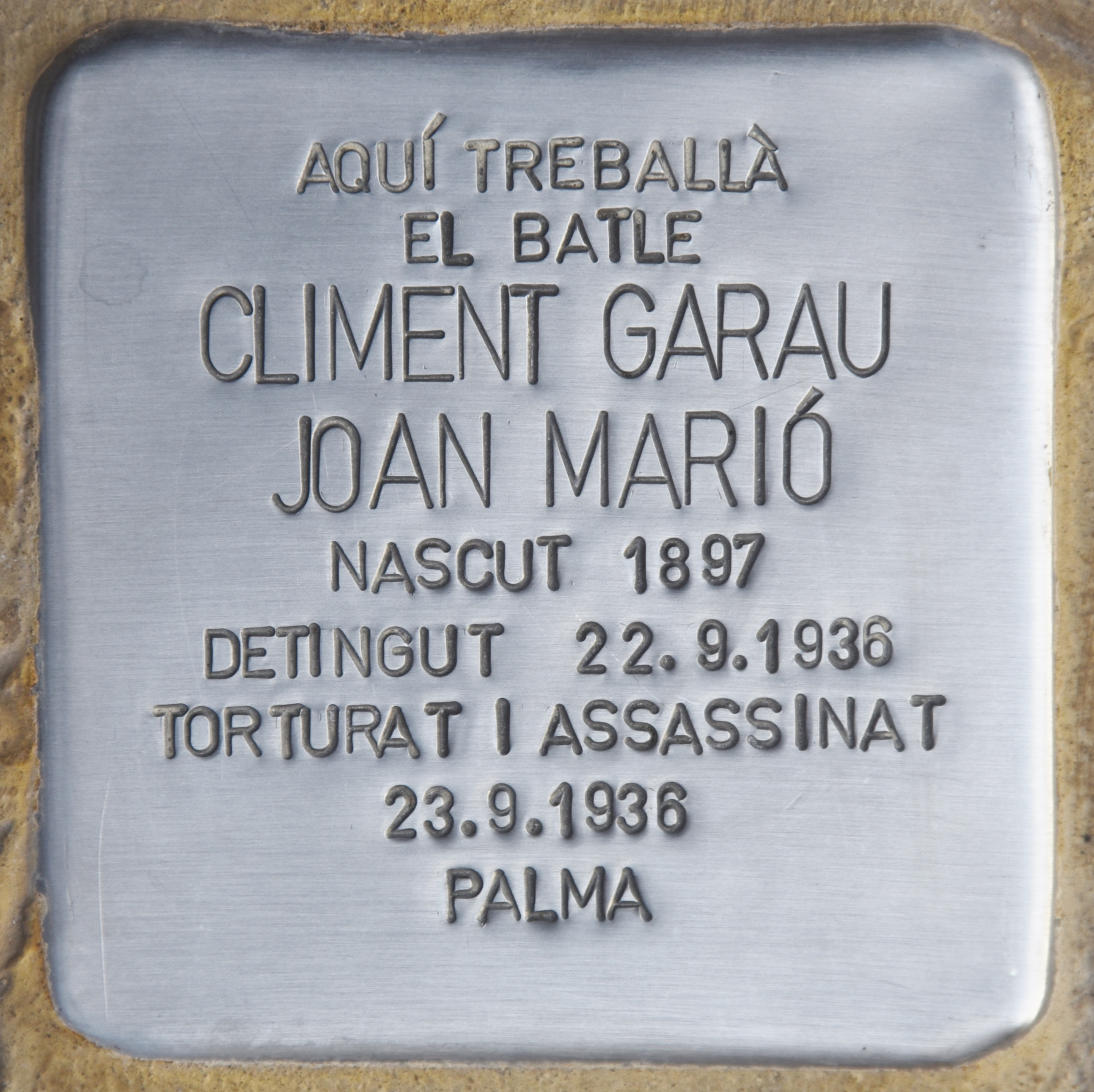 Remembrance Stone für Climent Garau Joan Mario